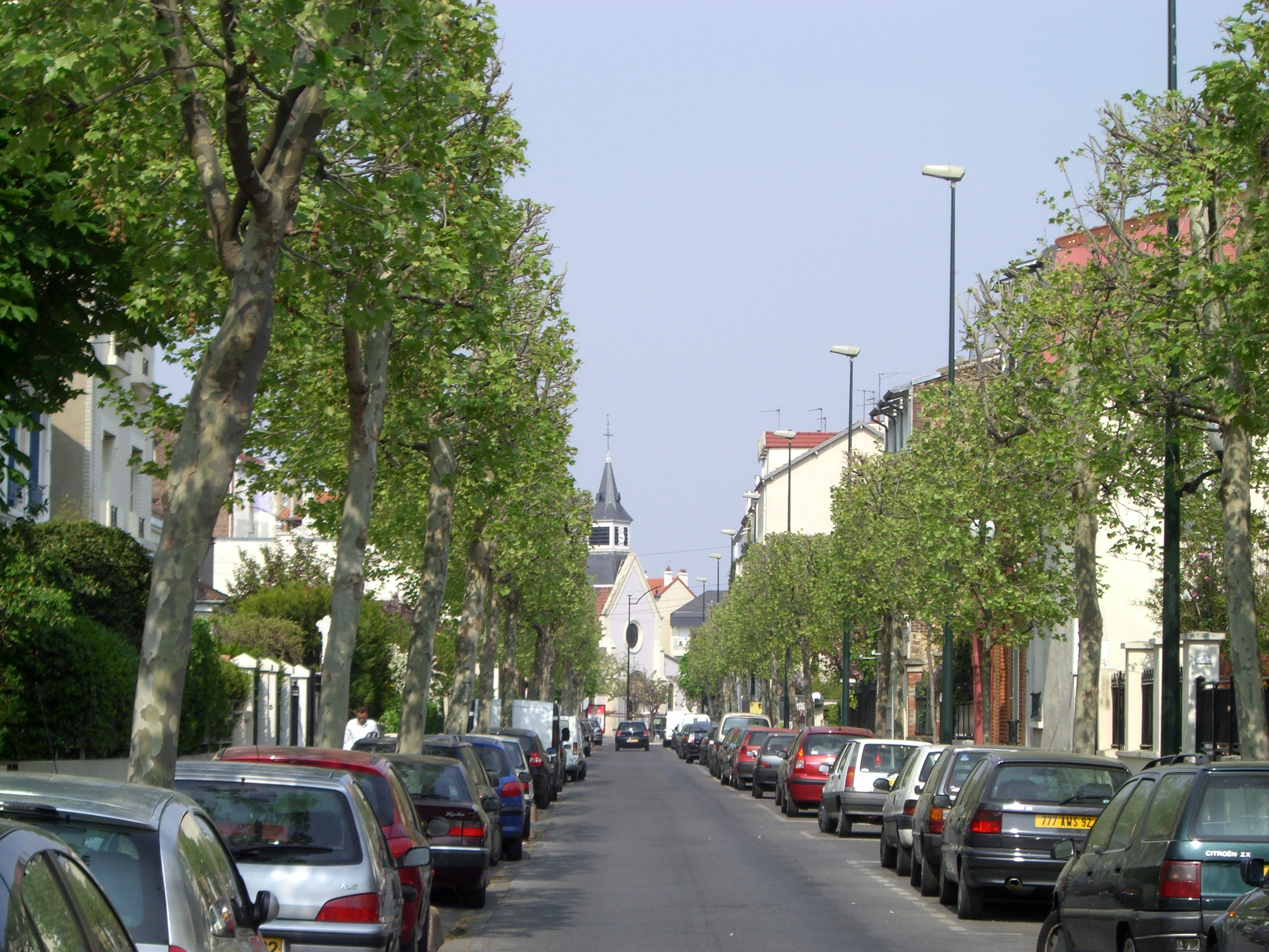 église Saint-Urbain, la Garenne-Colombes, Hauts-de-Seine (France).